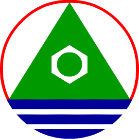 國立海山高工Logo